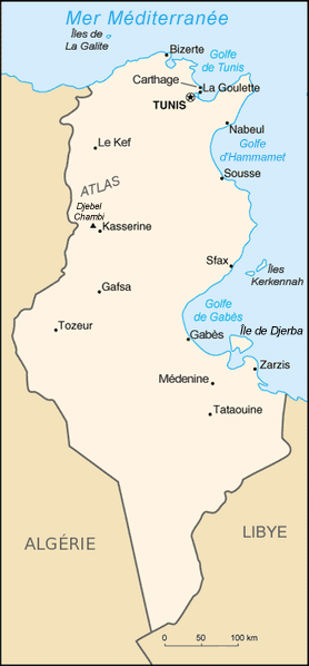 Carte de la Tunisie Source : CIA World Factbook (traduction) Historique de la carte originale Image:Tunisia_sm03.png (suppr) (actu) 17 septembre 2005 à 20:28 . . Sting . . 330x710 (36001 octets) (Orthographe Libye) (suppr) (rétab) 14 septembre 2004 à 16:36 . . Arnaudus . . 330x710 (32528 octets) (traduction française) (suppr) (rétab) 14 septembre 2004 à 16:29 . . Arnaudus . . 330x710 (10770 octets) (suppr) (rétab) 22 novembre 2003 à 16:51 . . Rinaldum . . 330x710 (12046 octets) (de en:)